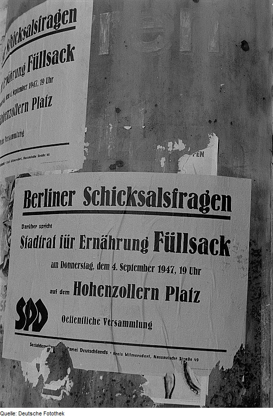 Original image description from the Deutsche Fotothek Berlin. Plakate mit Ankündigung einer Versammlung der SPD zu "Berliner Schicksalsfragen": Gespräch mit Stadtrat für Ernährung Füllsack am 14.9.1947